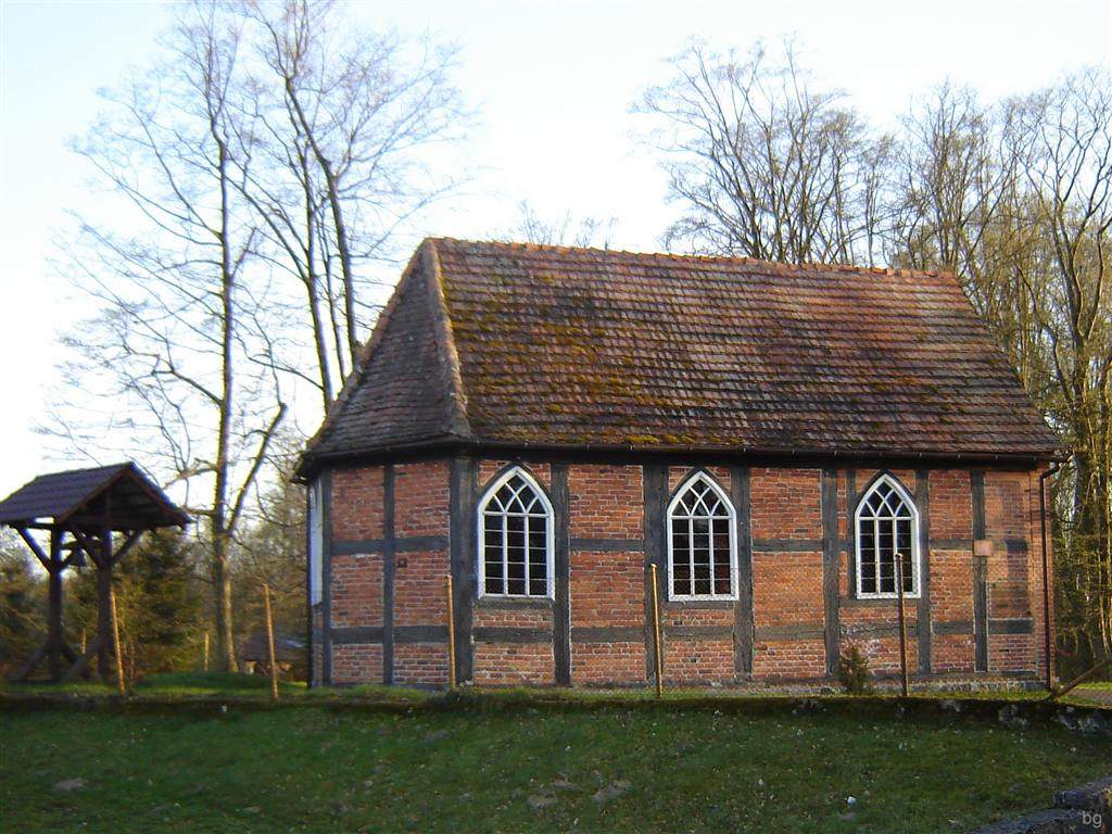 Kościół w Tyczewie.